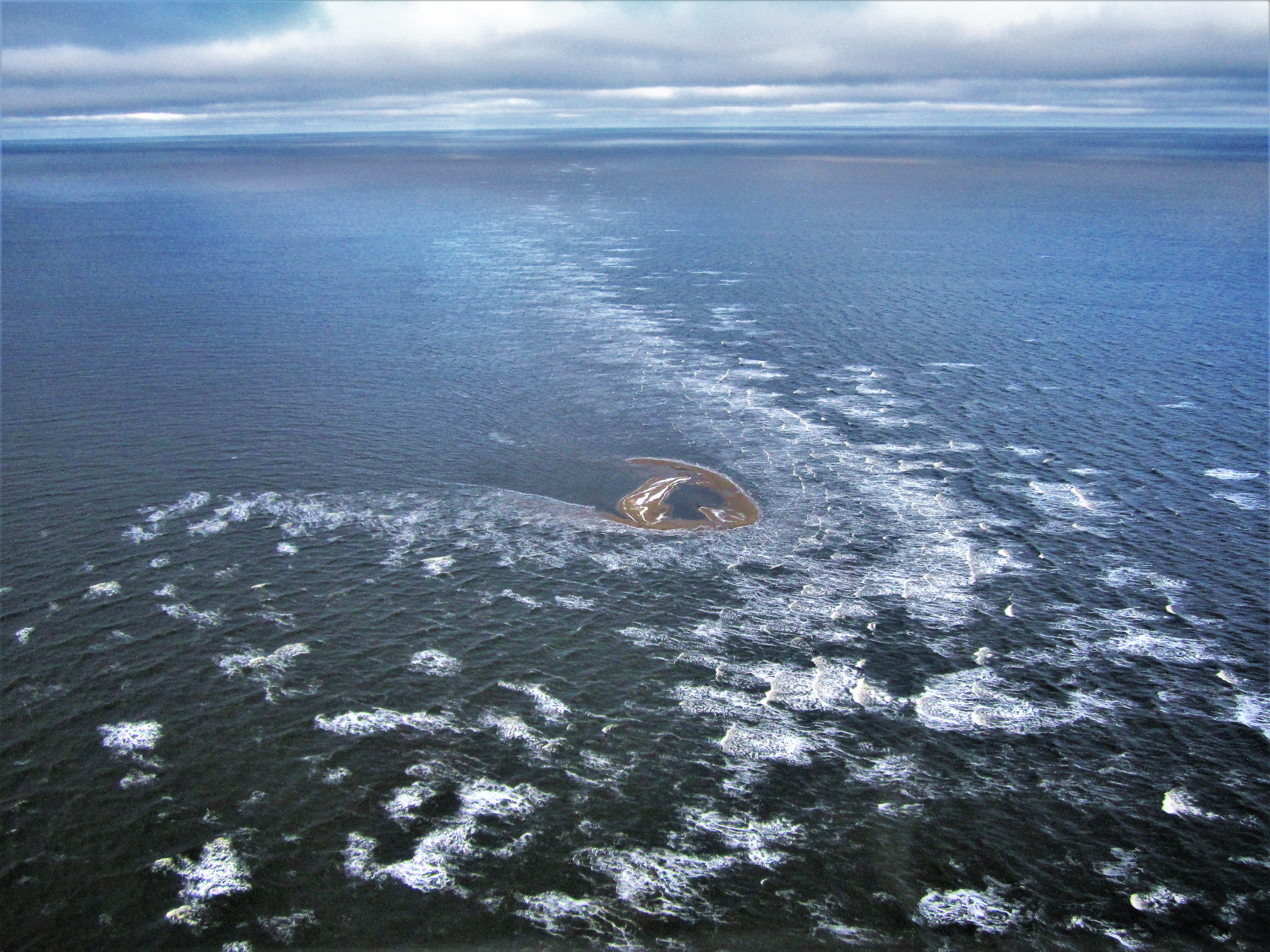 Остров Яя, открыт в 2013 году, фото сделанное первооткрывателями